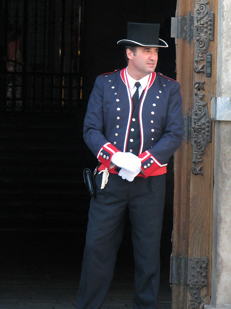 Mosso d'Esquadra al Palau de la Generalitat, uniforme de gala.